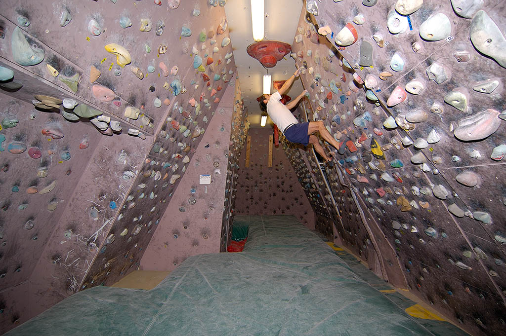 Rocódromo